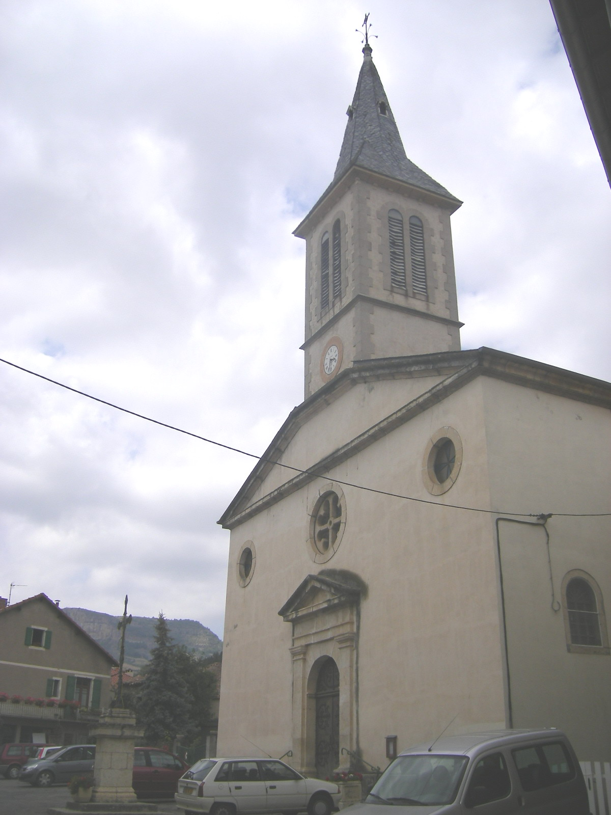 Rivière-sur-Tarn (Aveyron) - église